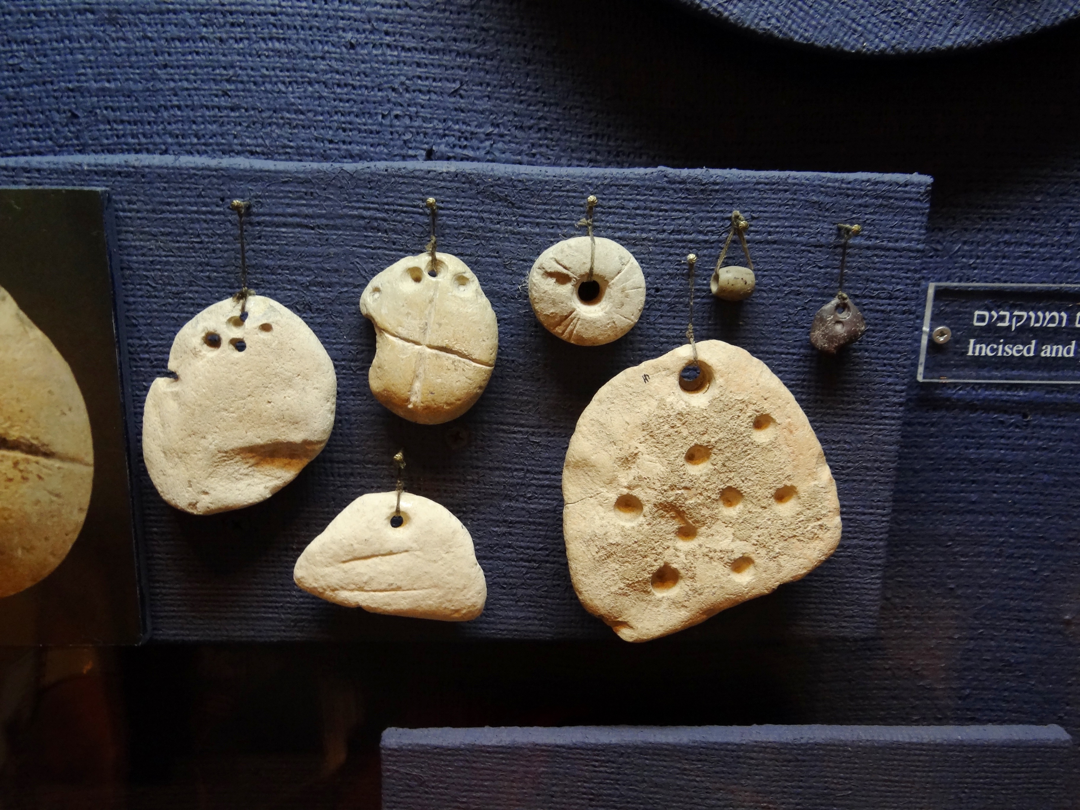 Yarmukian Culture Museum in kibbutz Shaar Hagolan, Israel המוזיאון לתרבות הירמוכית ע"ש יהודה רות השוכן בקיבוץ שער הגולן בעמק הירדן תליונים מחורצים ומנוקבים